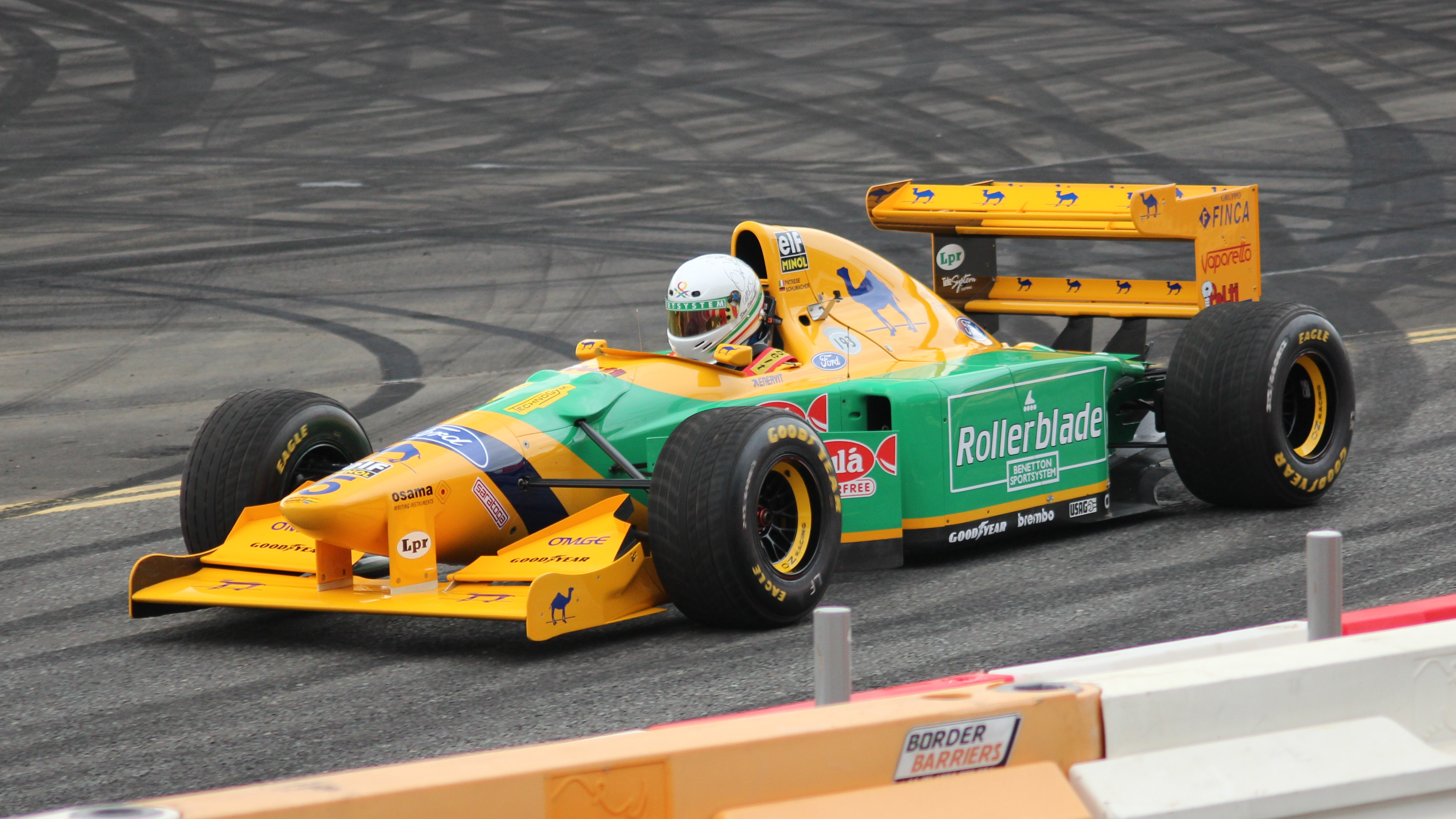 Ignition Festival Glasgow